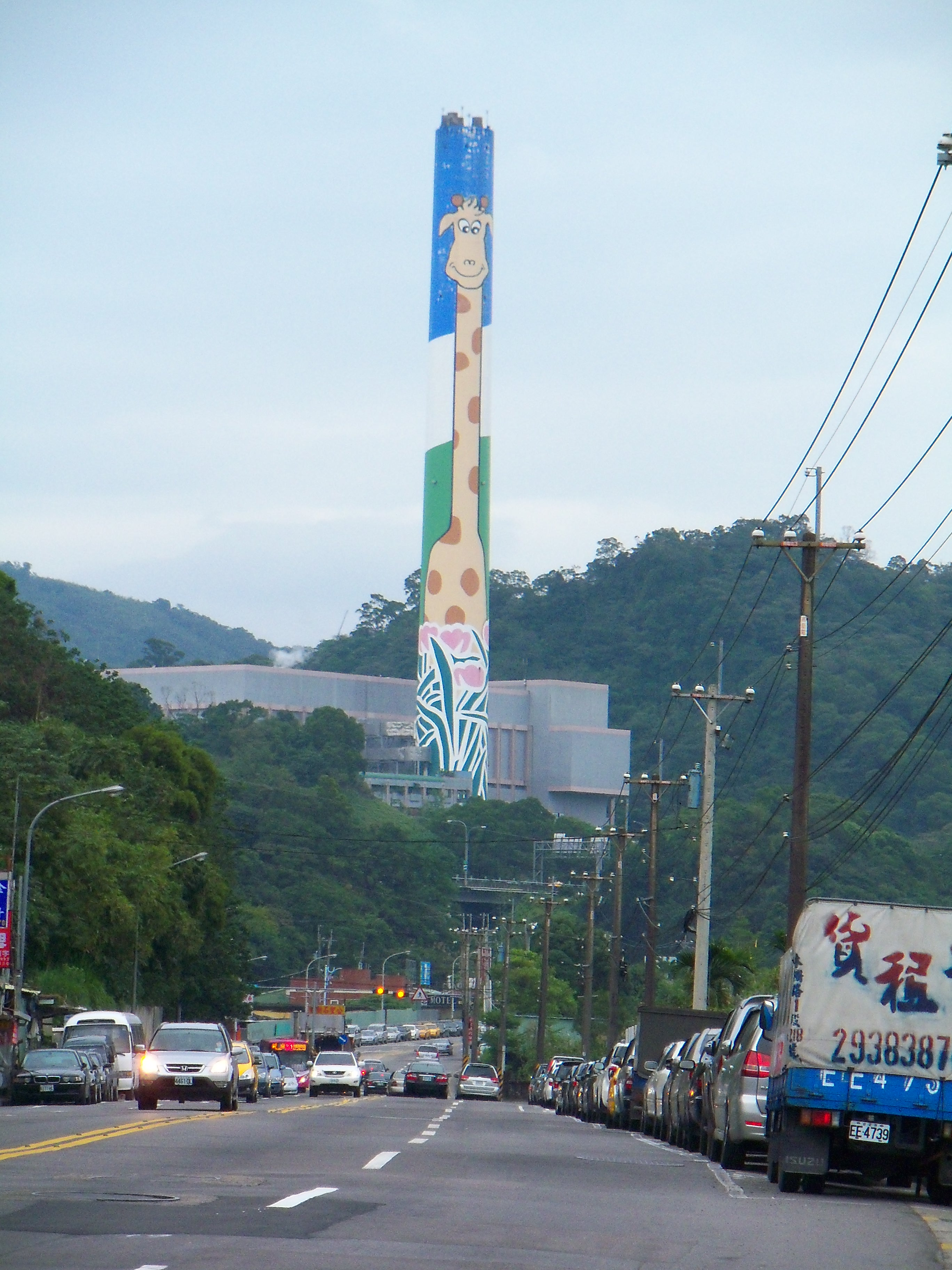 中文（台灣）: 從臺北市文山區木柵路四段東望木柵垃圾焚化廠。